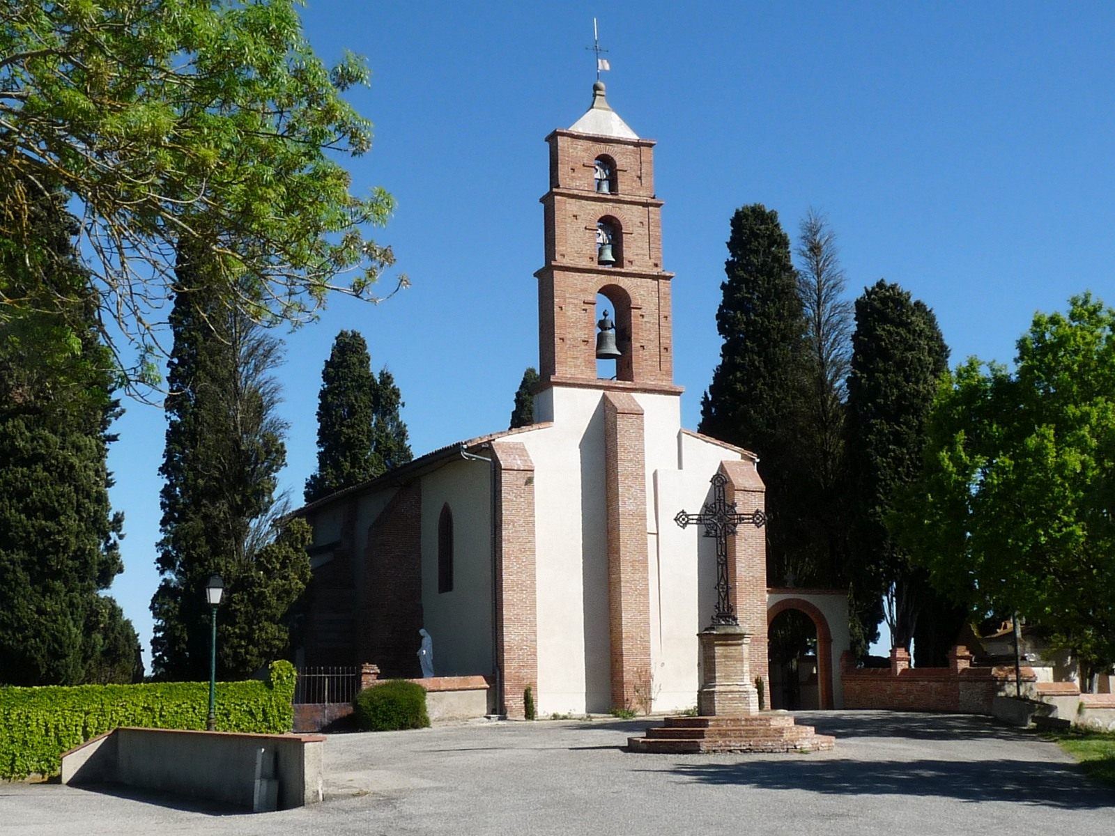 Eglise de St-Pierre-de-Lages, Haute-Garonne, France